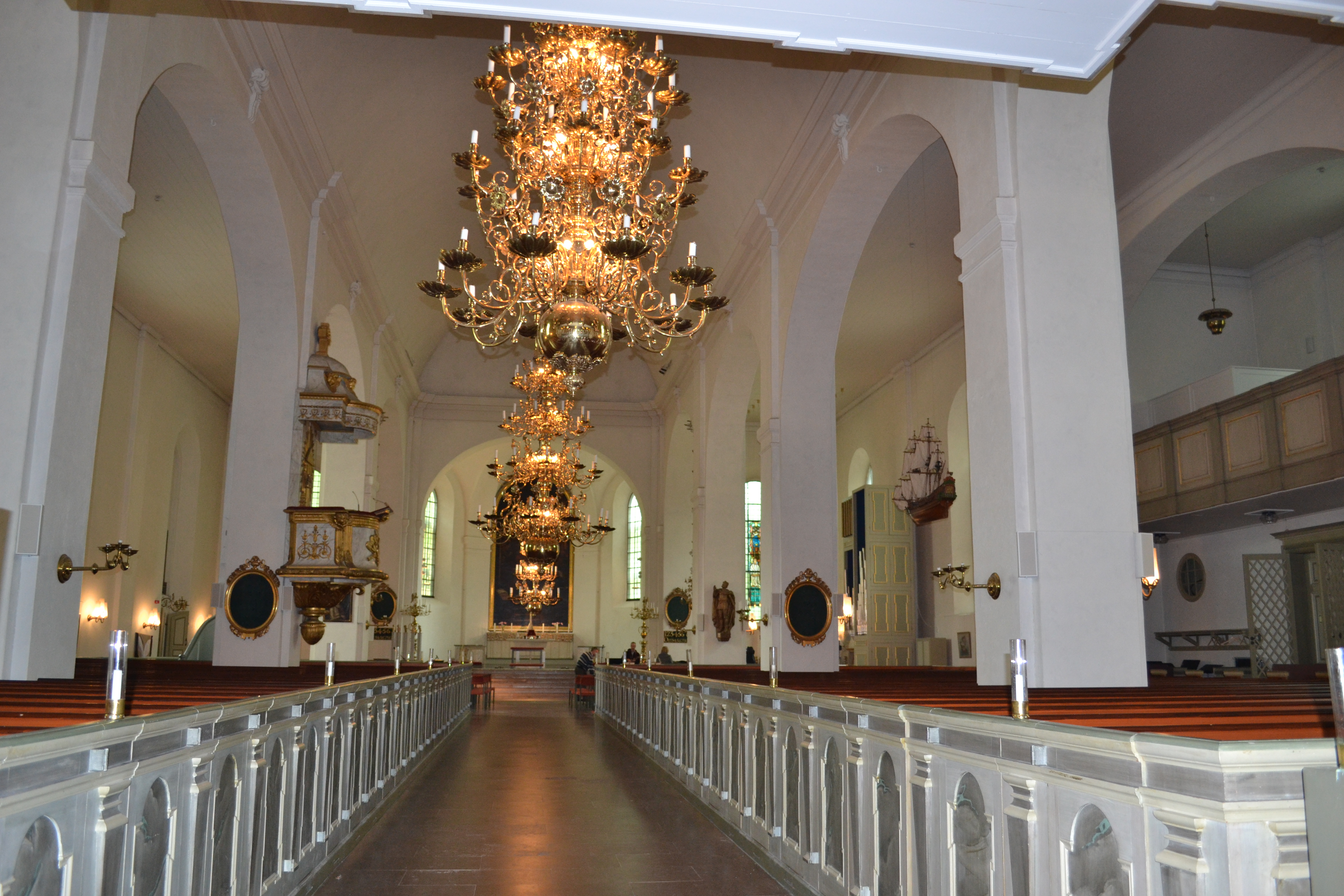 Sankt Olai kyrka in Norrköping